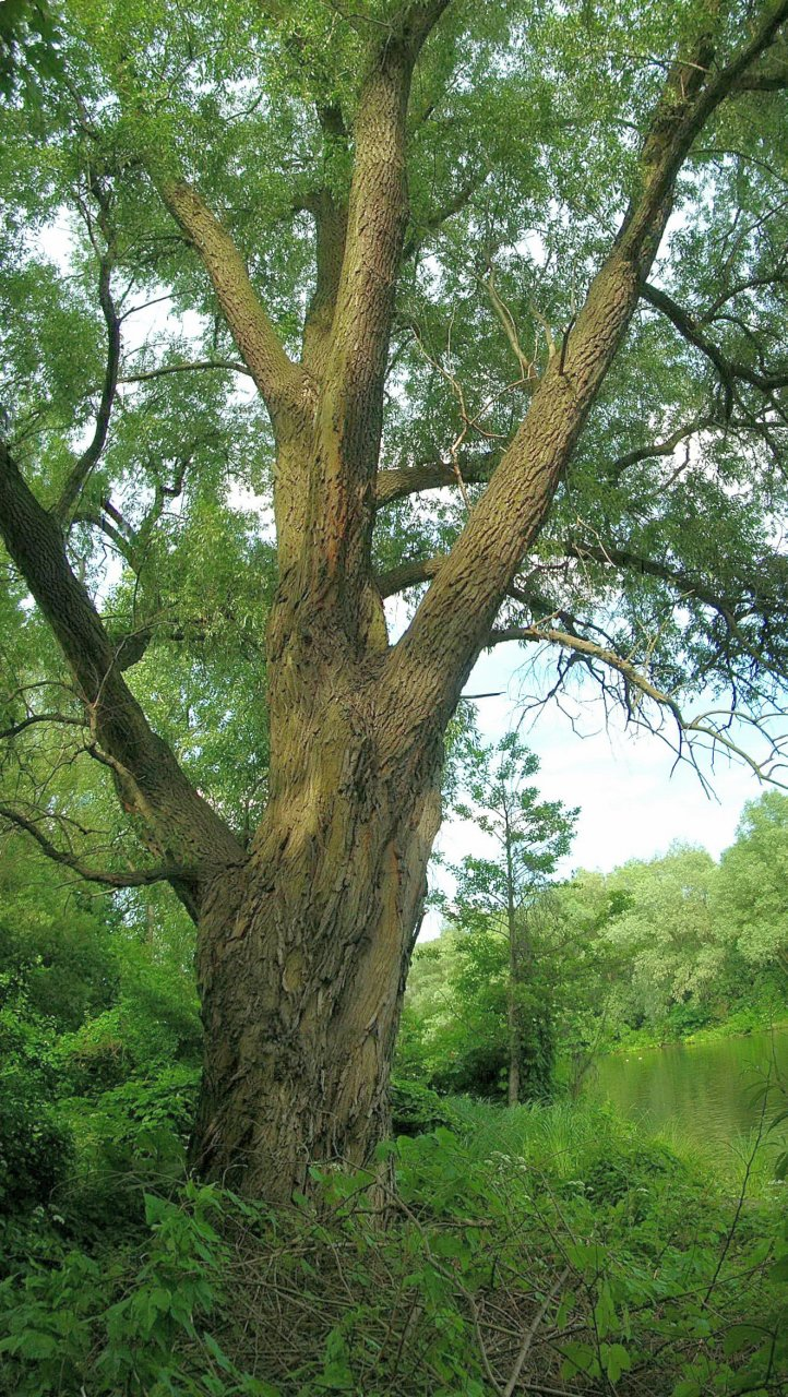 Wierzba o wymiarach pomnika przyrody nad Brdą w Bydgoszczy